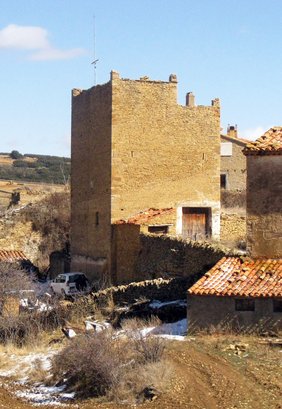 Torre de la Pobla de Bellestar (Vilafranca, Alt Maestrat)